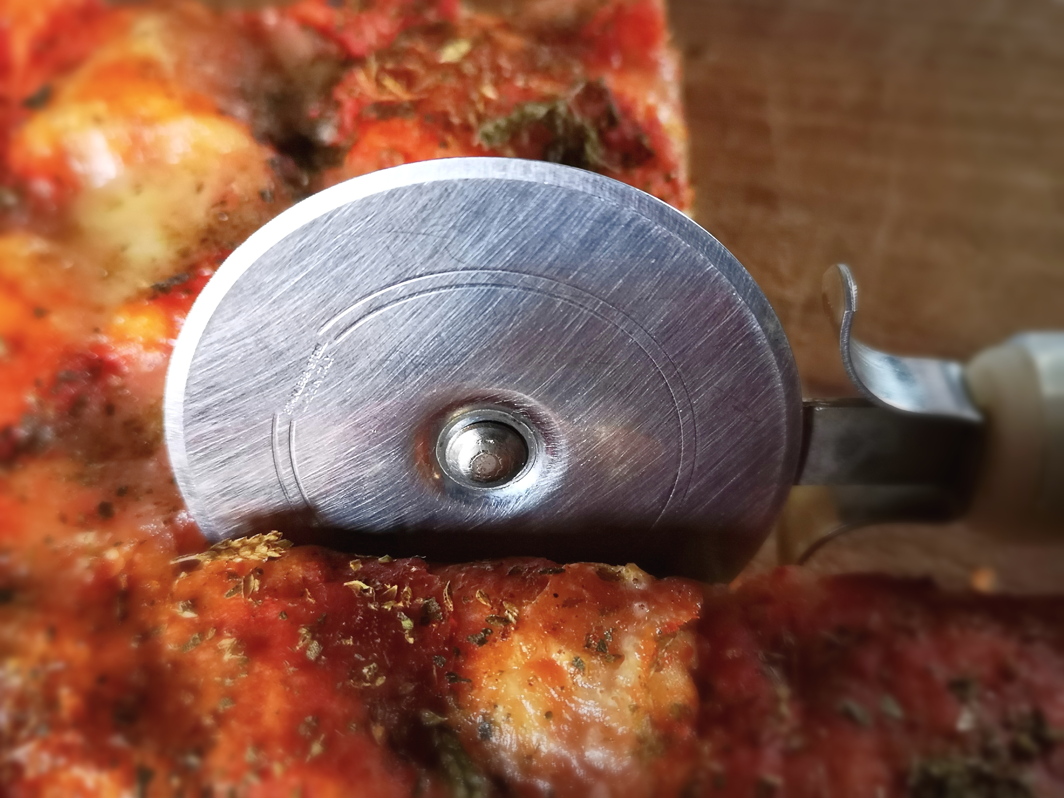 Rotella in acciaio per tagliare la pizza